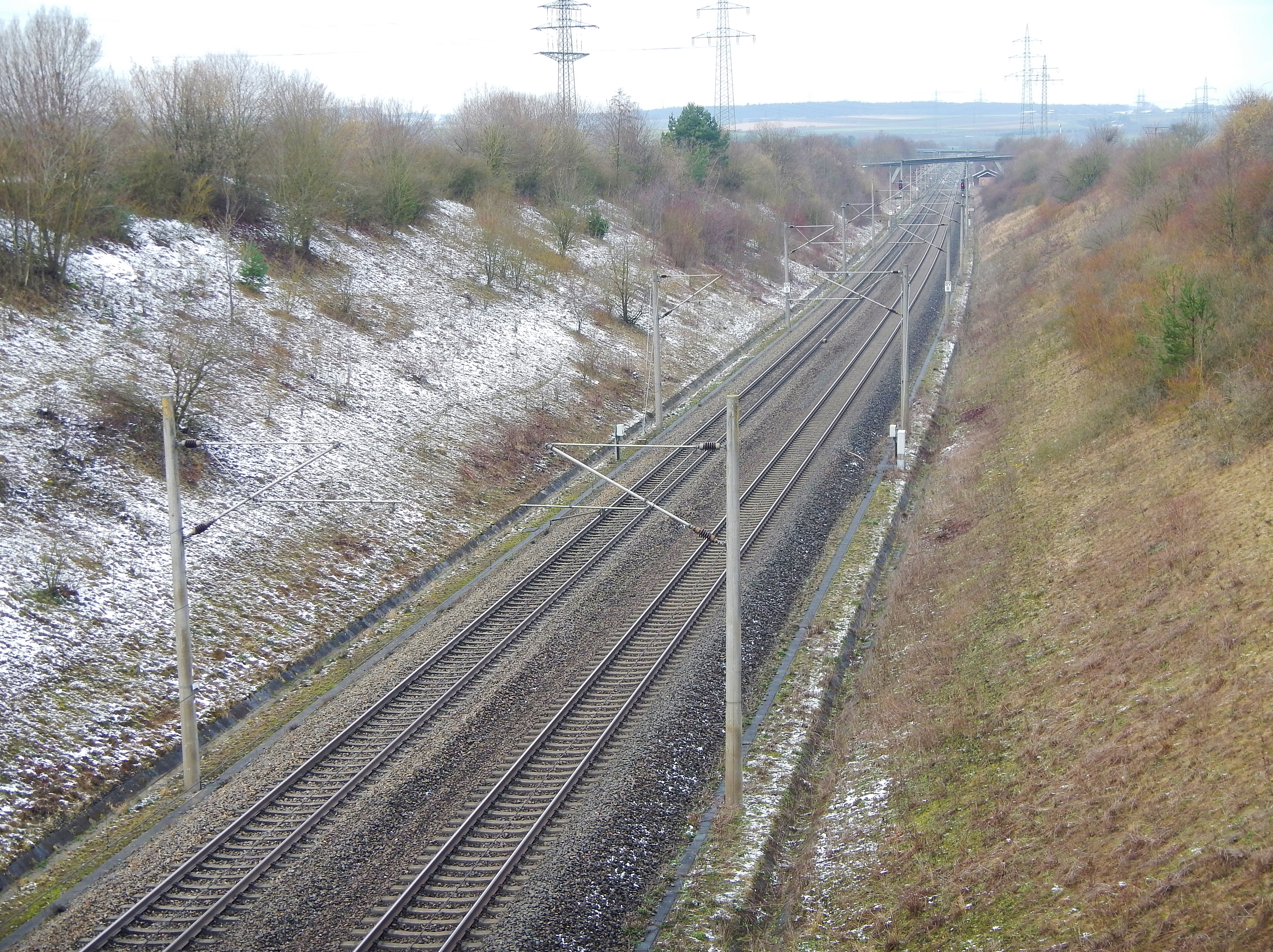 Schnellbahntrasse, Schnellfahrstrecke Mannheim–Stuttgart